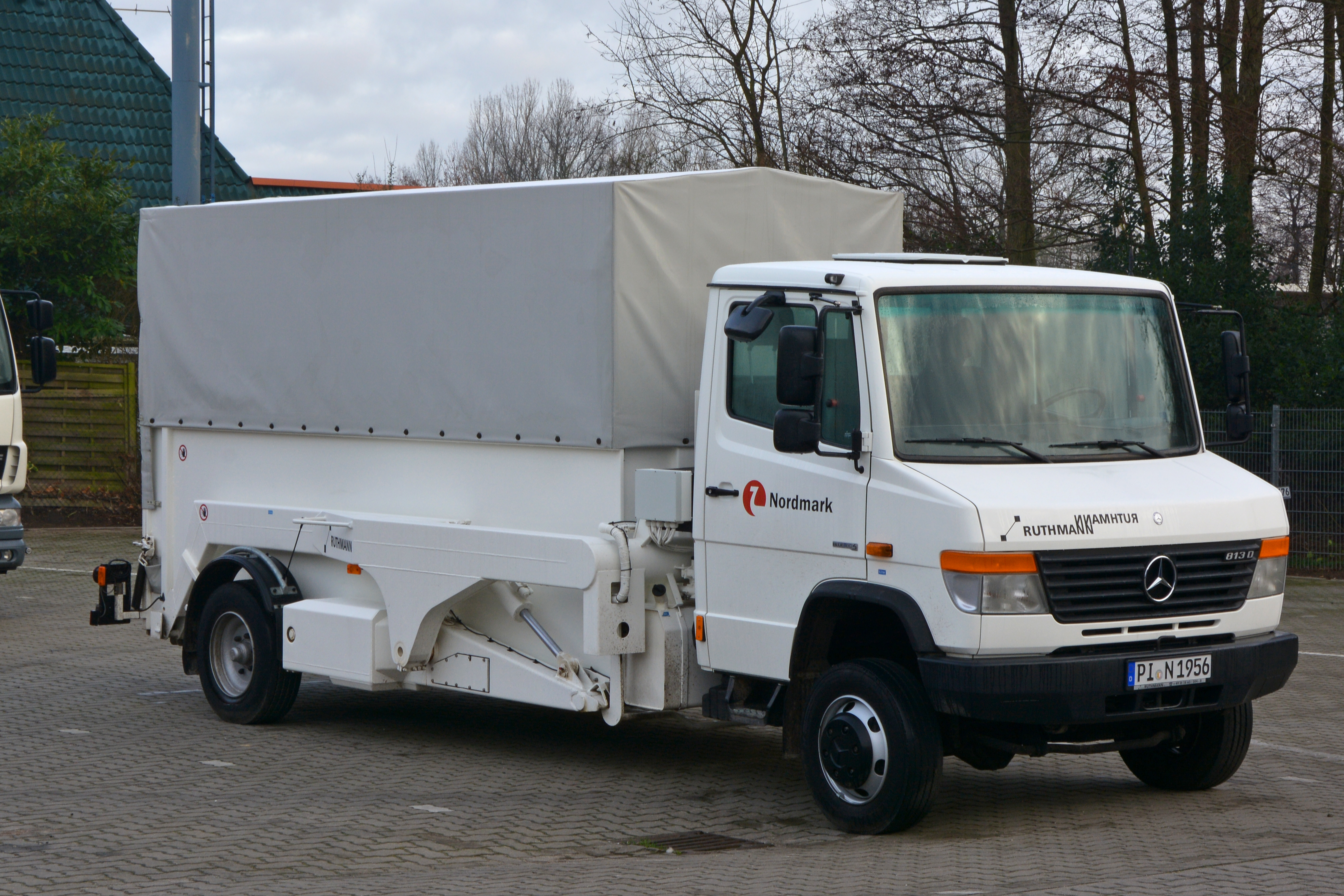 Ruthmann Cargolader auf Mercedes-Benz Vario 813 D Basis